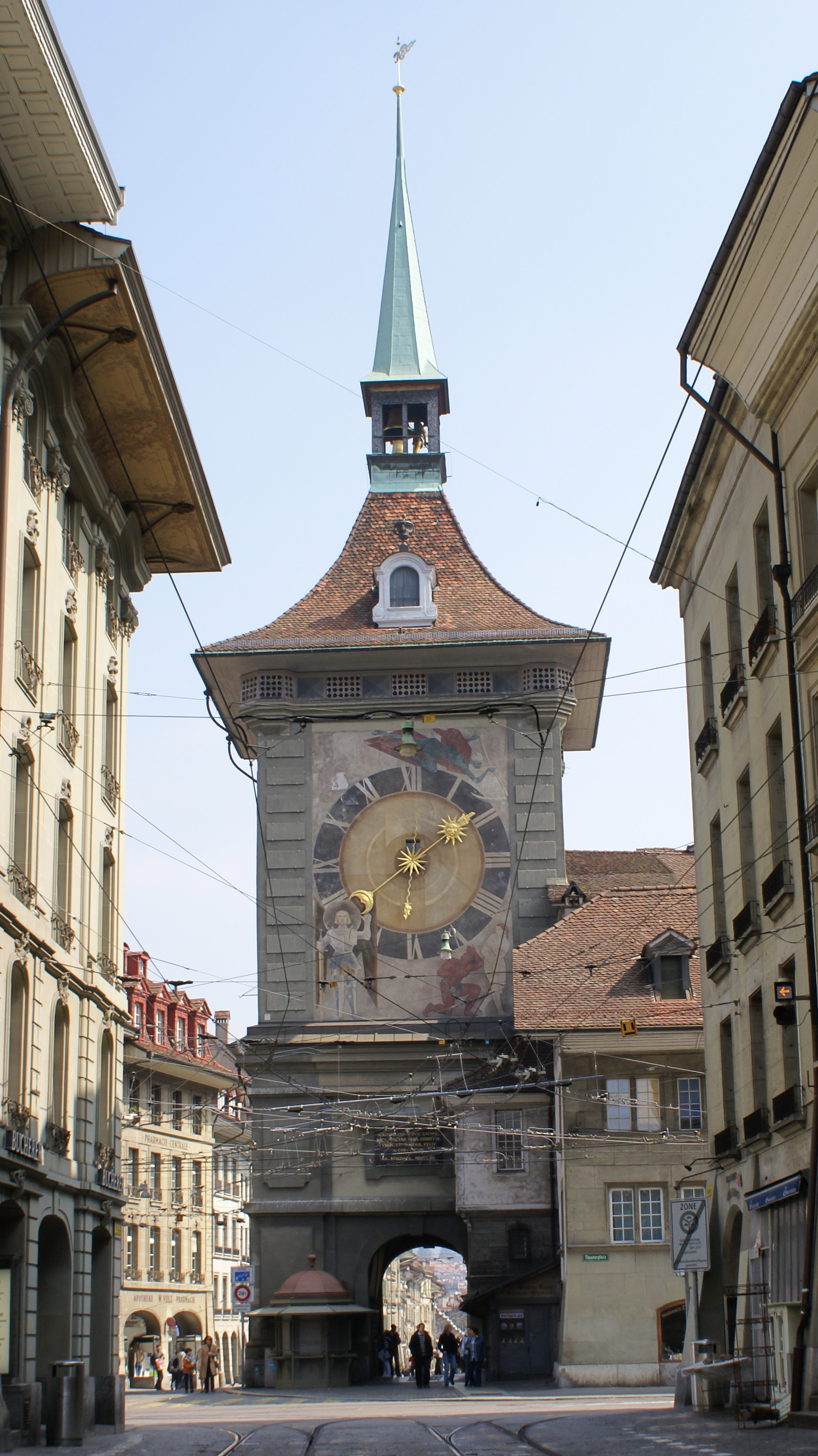 Zytglogge tower in Bern, Switzerland. West façade.